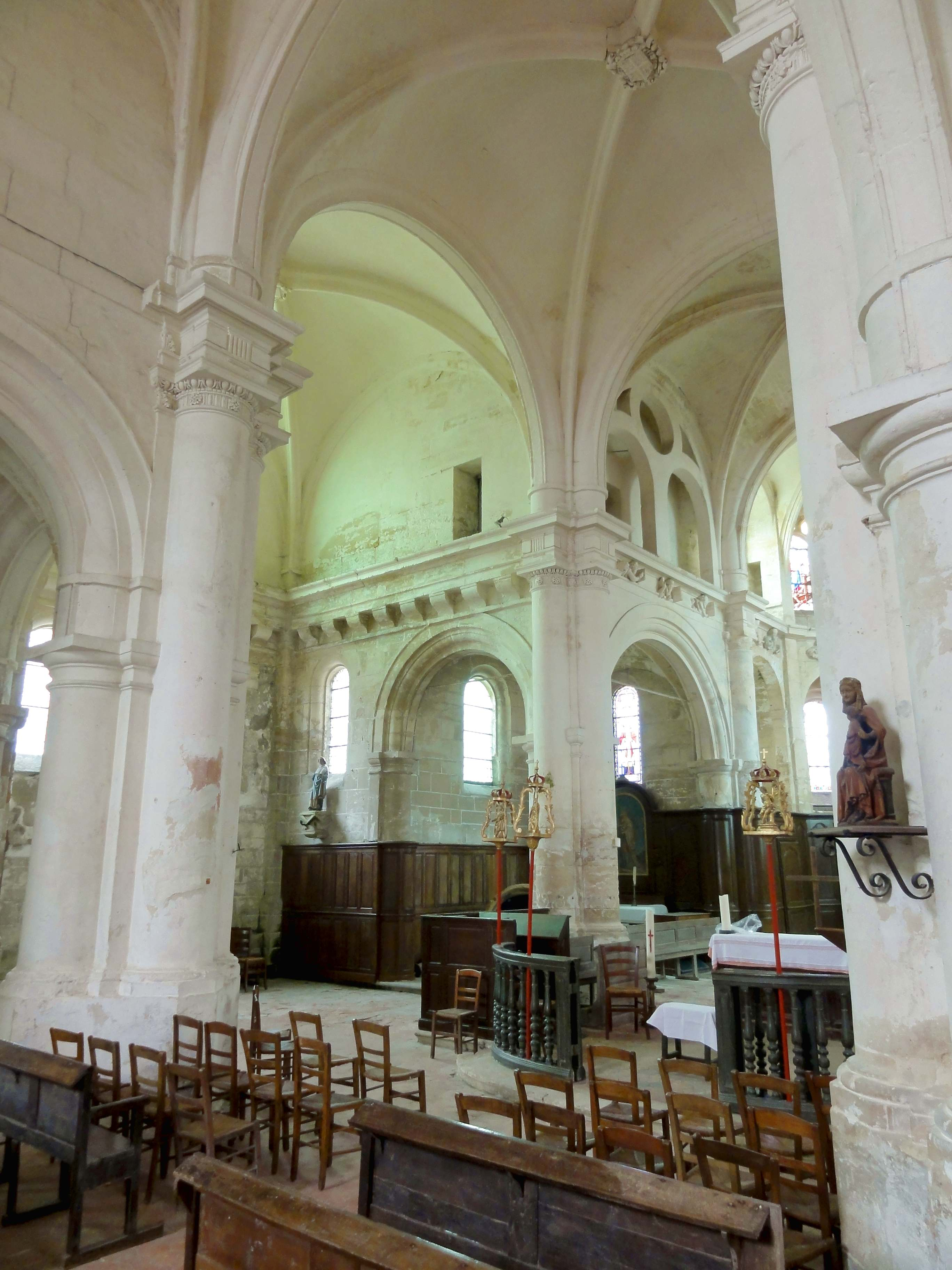 Intérieur de l'église (voir titre).